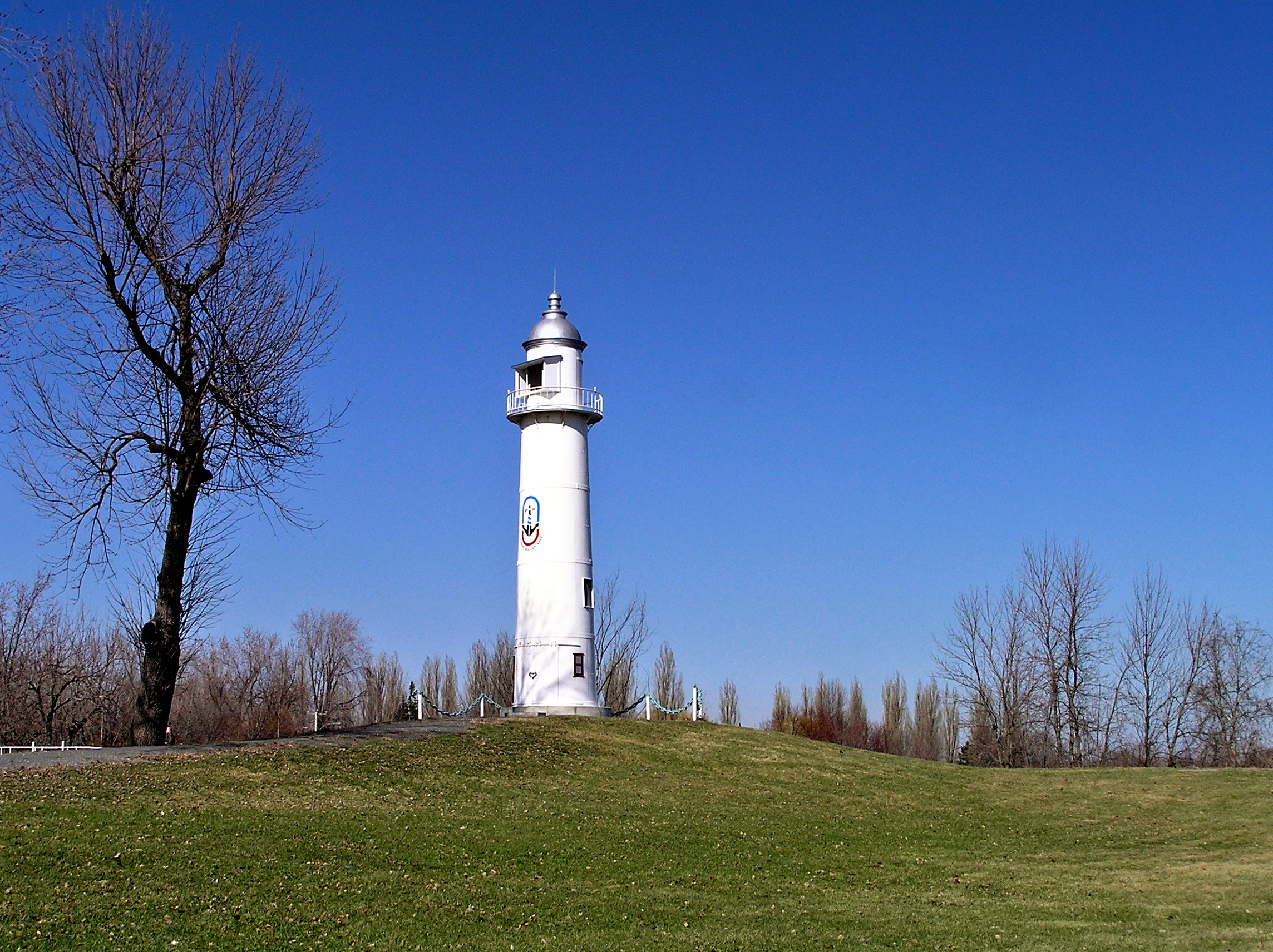 Pointe-des-Cascades (Québec) - Phare du Parc des Ancres